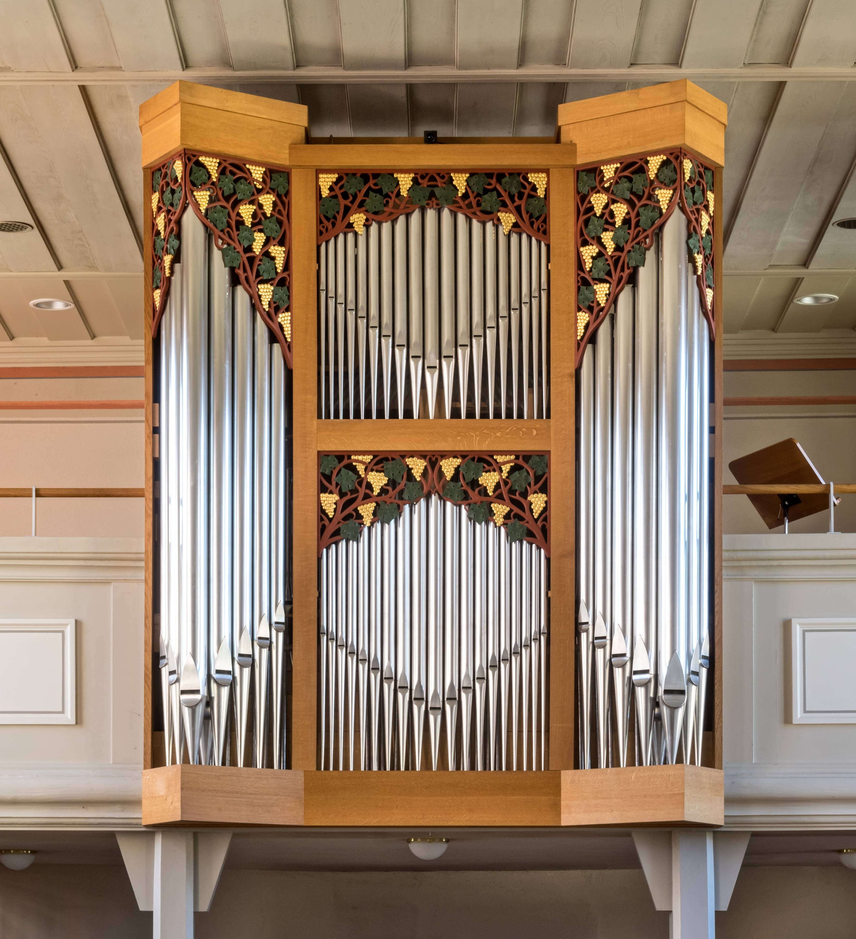 St. Agatha in Grunern, einem Teilort von Staufen Orgel